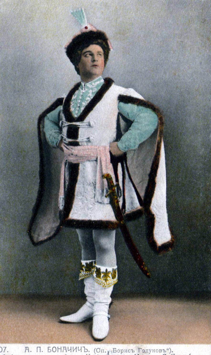 А. Боначич. Борис Годунов